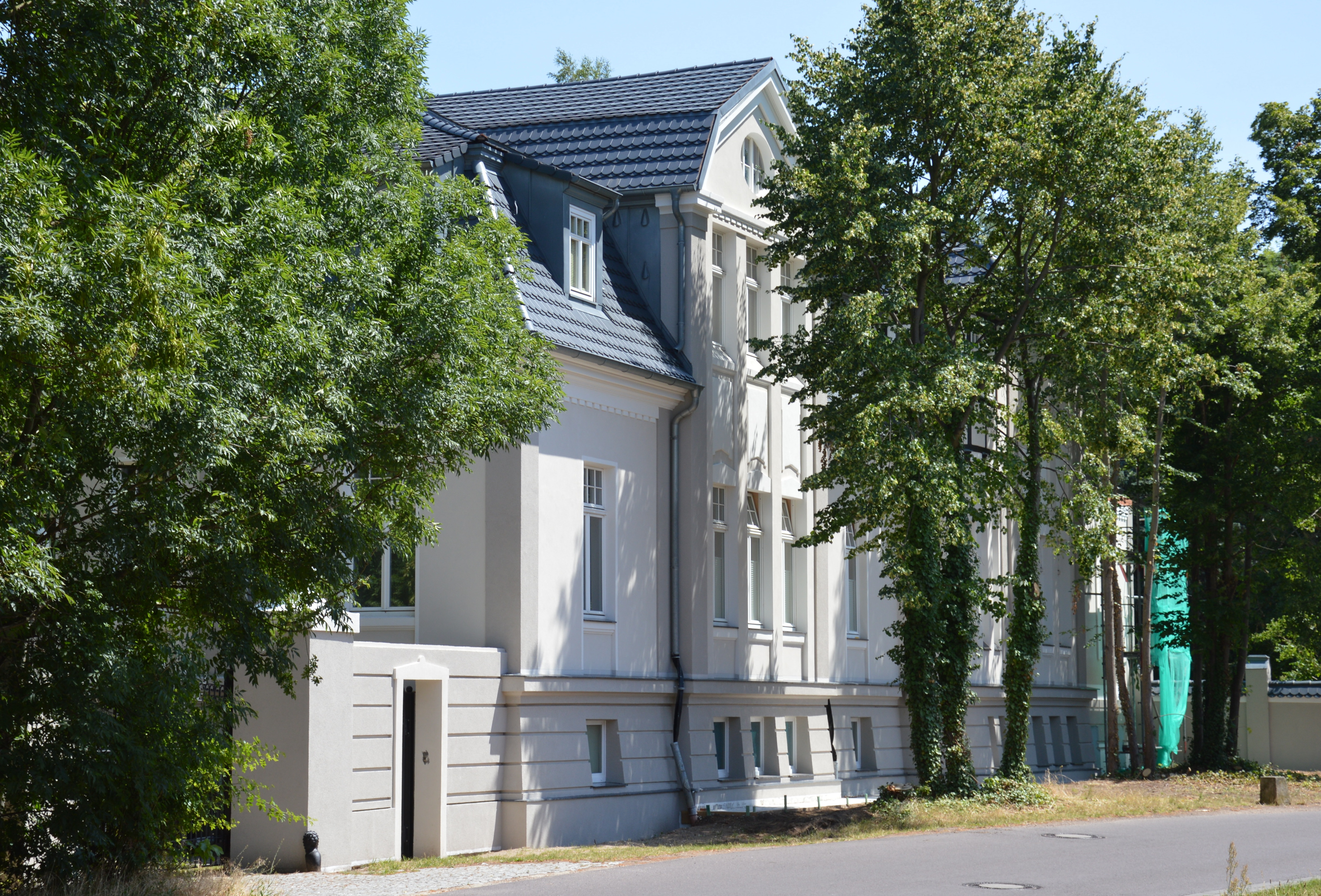 Haus Thälmannstraße 33 in Möser